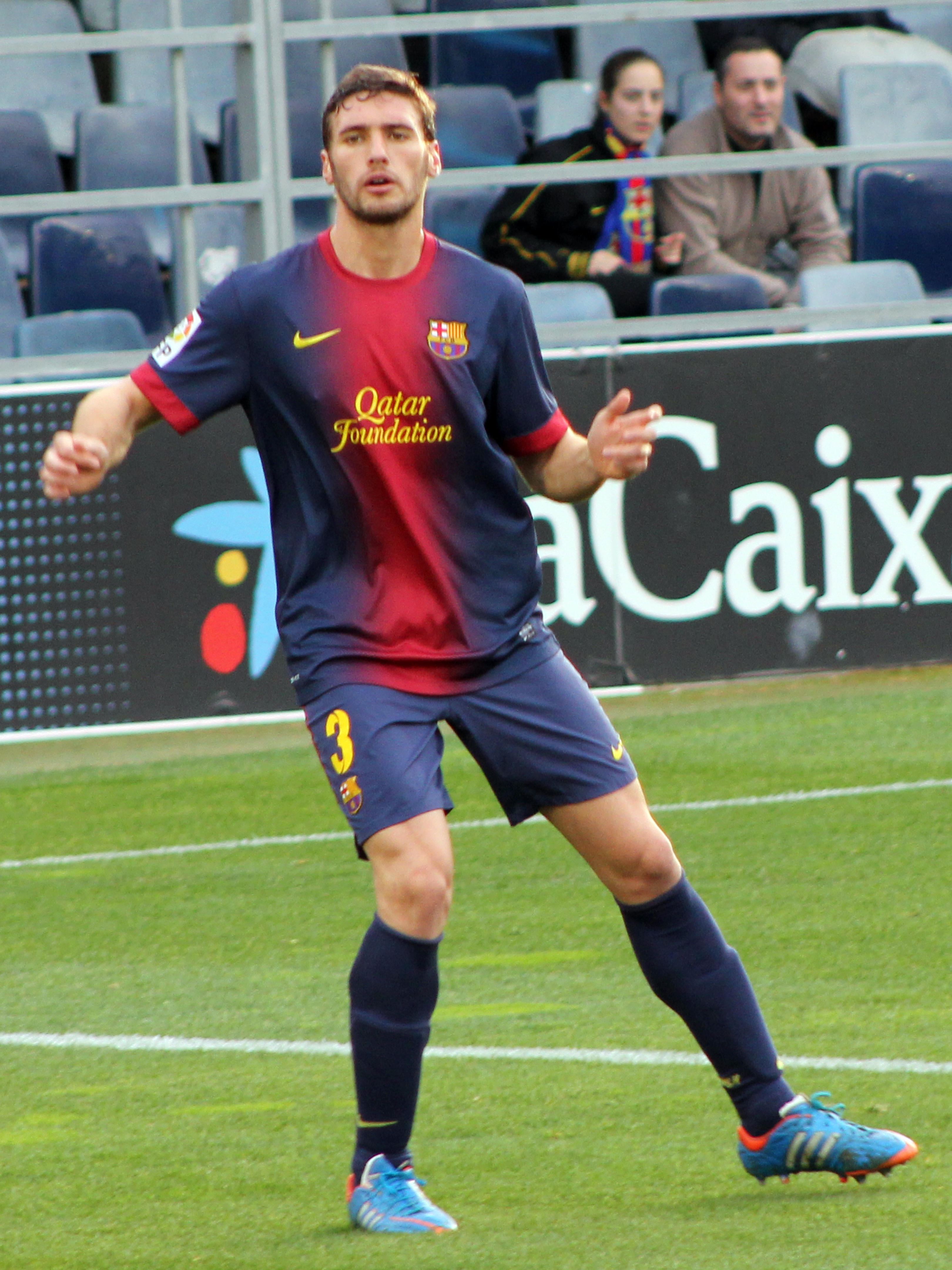 Foto realizada por Javier Segura (@castroquini en Twitter)